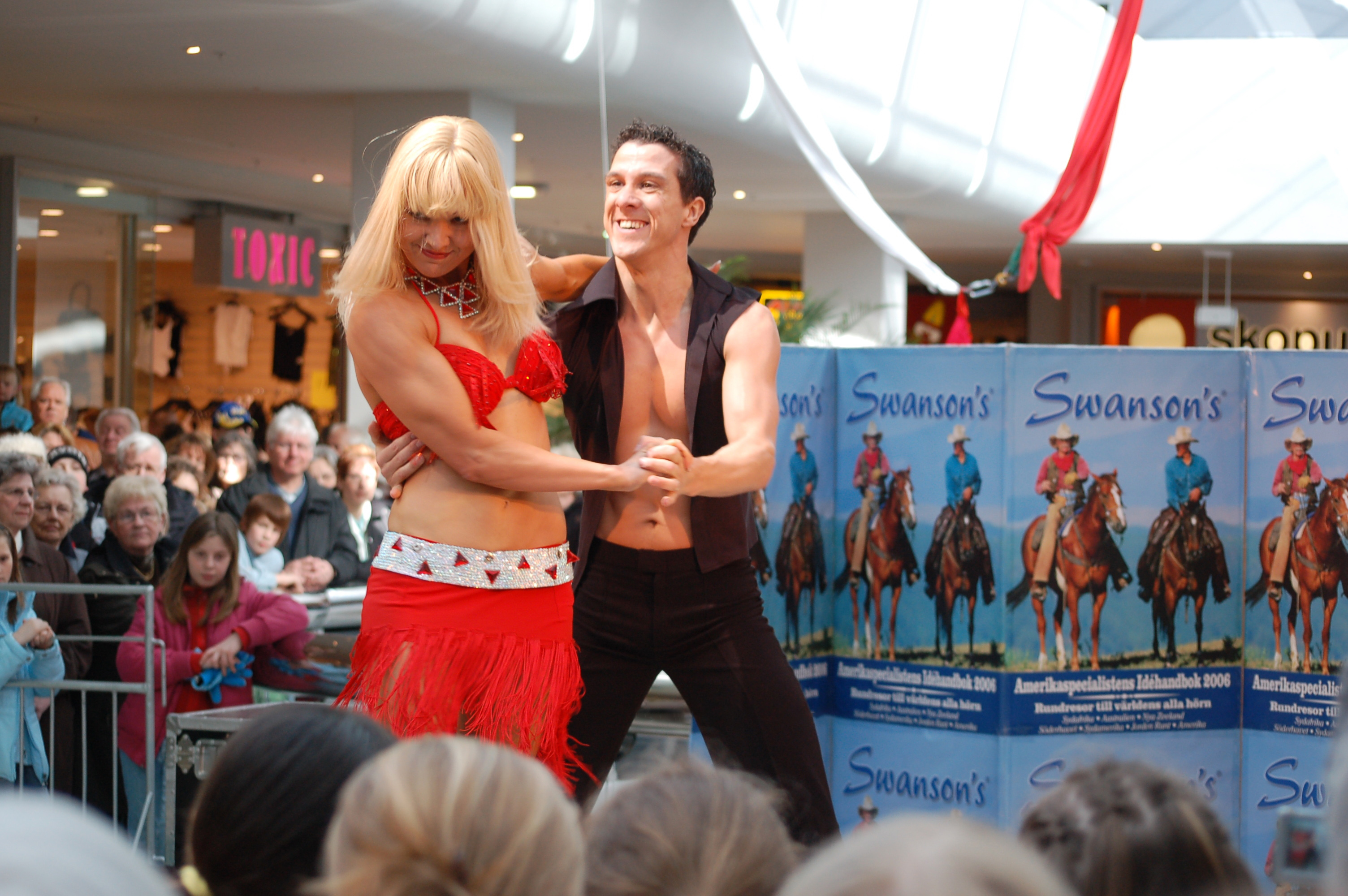 David & Malin Watson, Foto: Daniel Åhs Karlsson